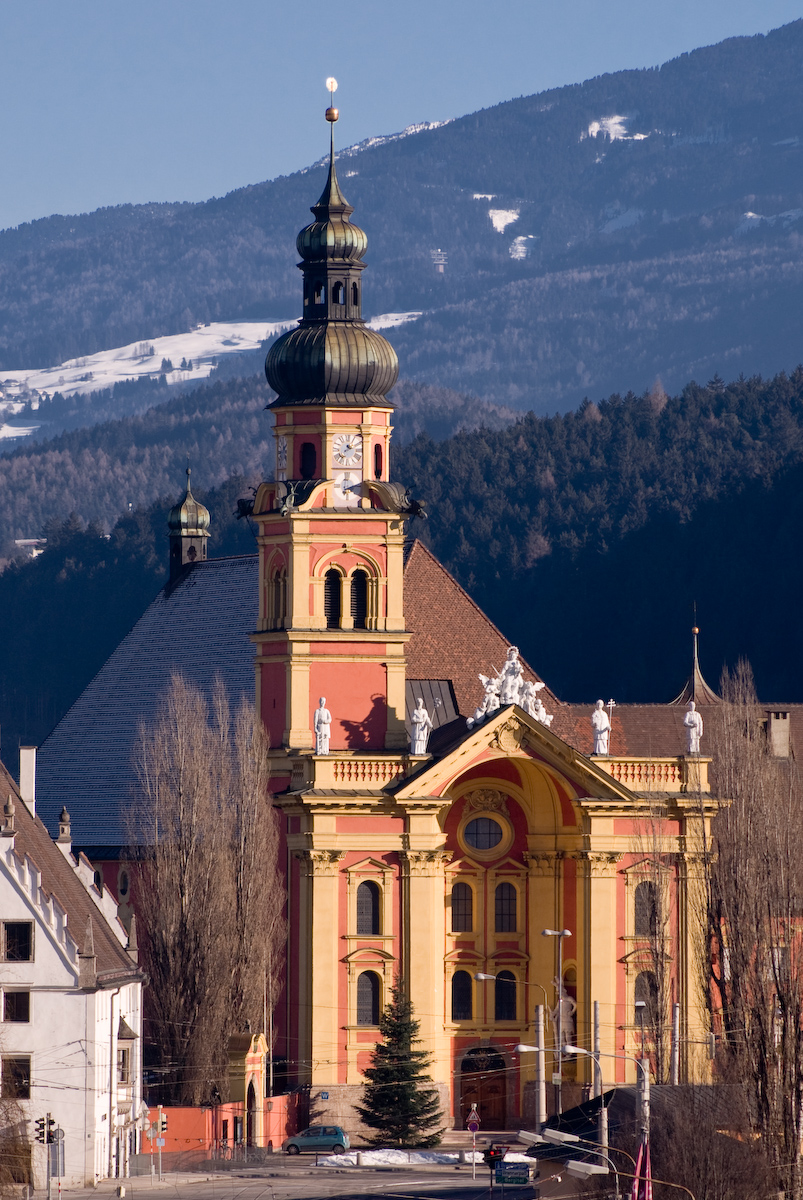 Stiftskirche Wilten, Hauptansicht